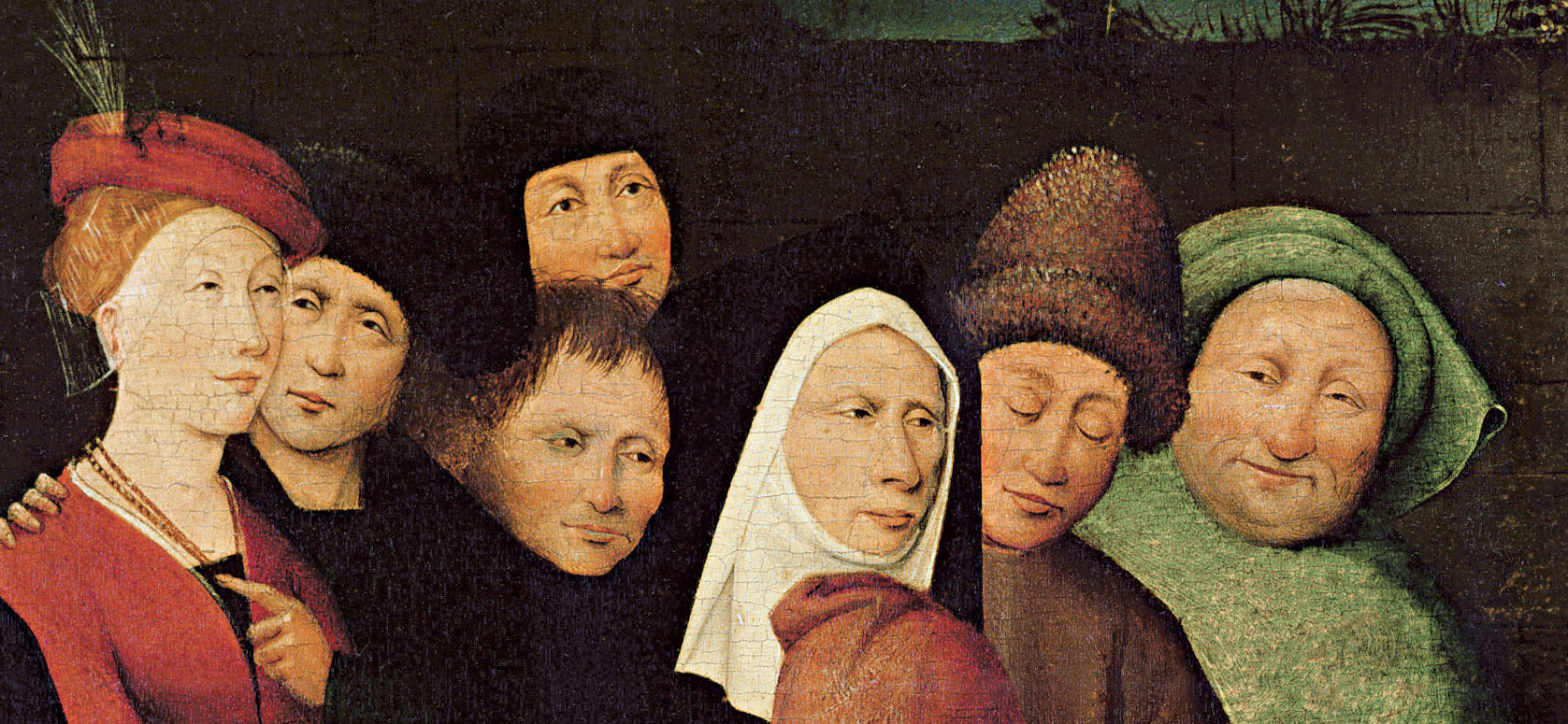 Détail de L'Escamoteur de Jérôme Bosch